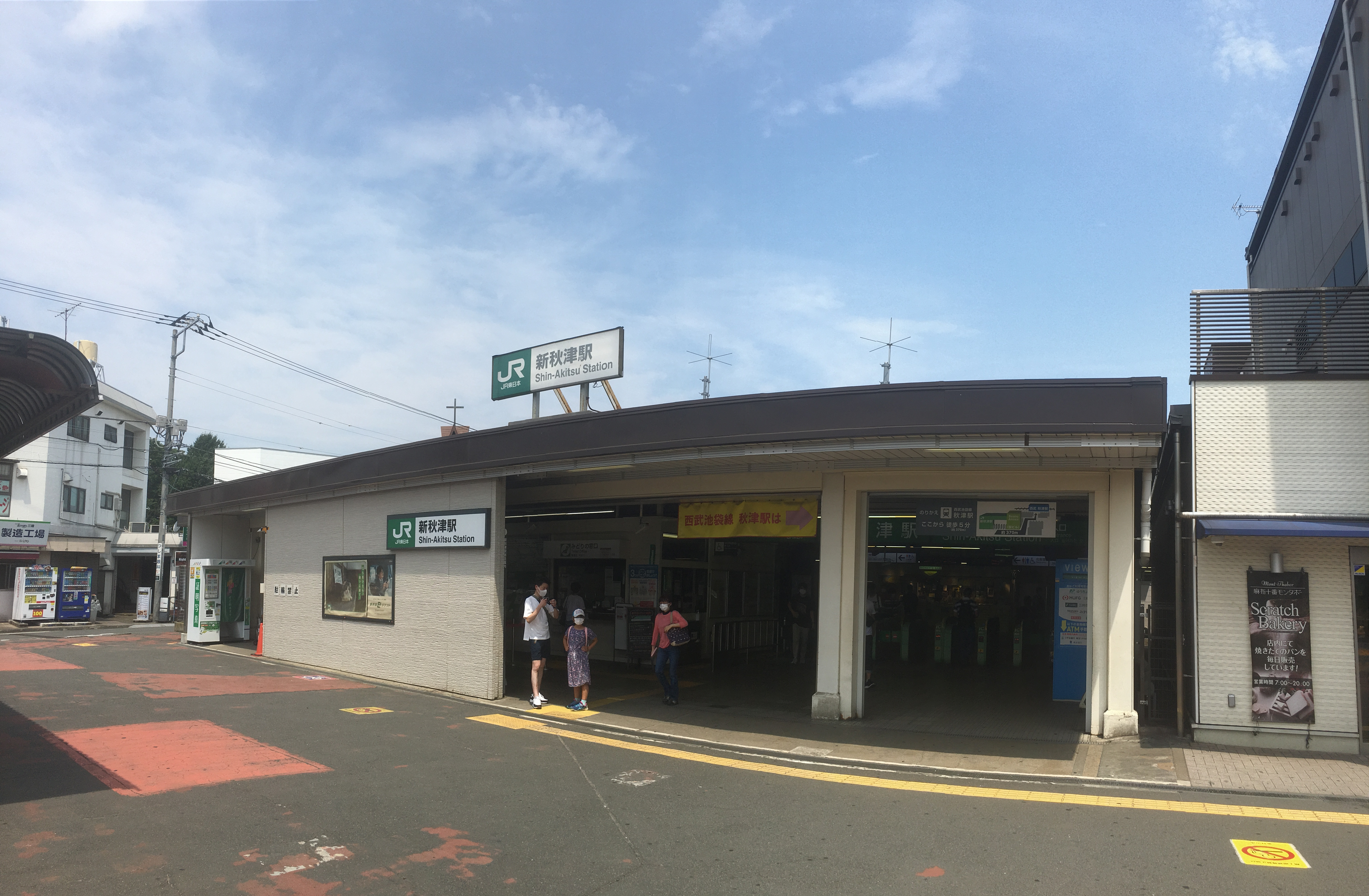 新秋津駅 (Shinakitsu Station)